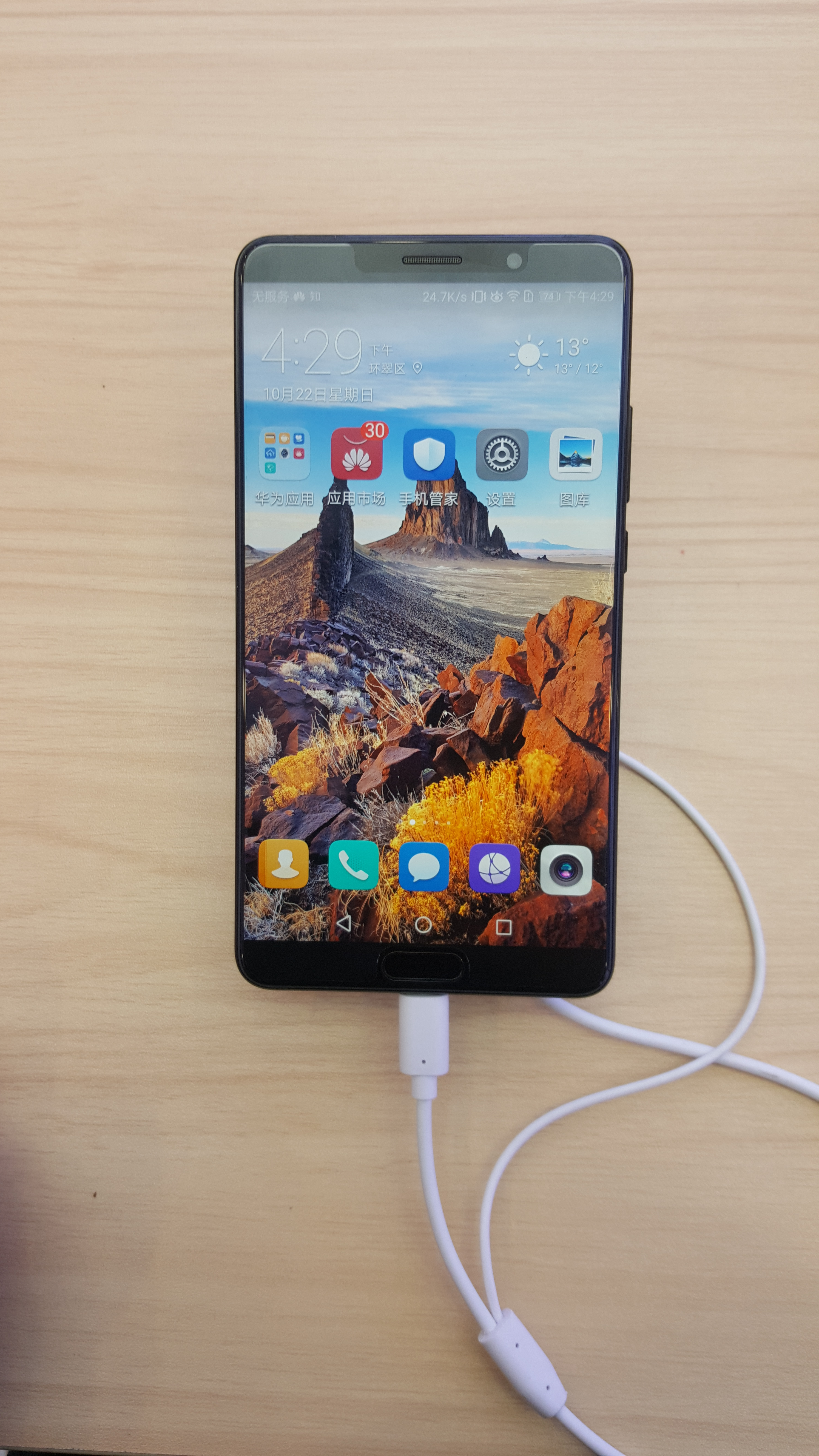 华为Mate10黑色版，拍摄于山东省威海市新威路华为体验店